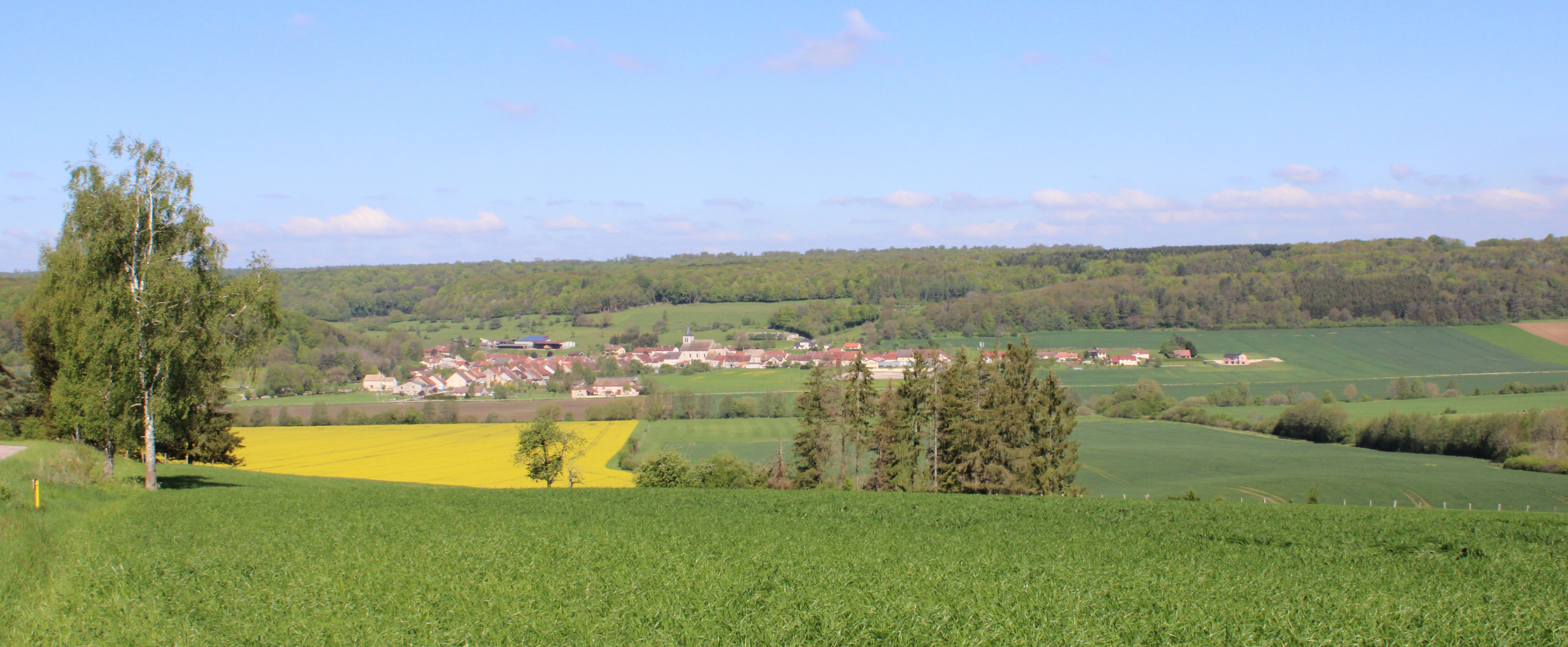 Panorama du village